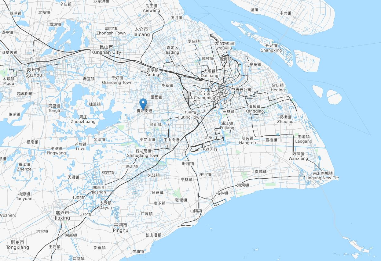 中文（中国大陆）: 曲水园在上海的位置